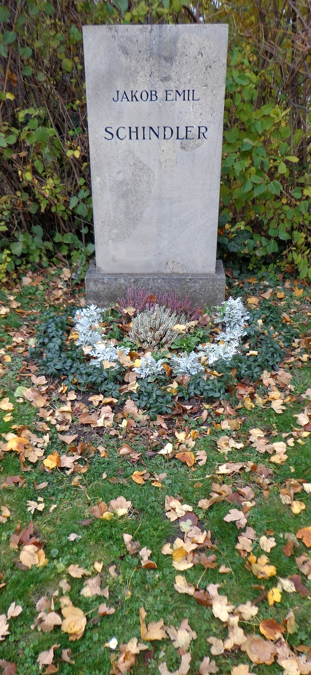 Wiener Zentralfriedhof - Gruppe 14A, Ehrengrab von Emil Jakob Schindler